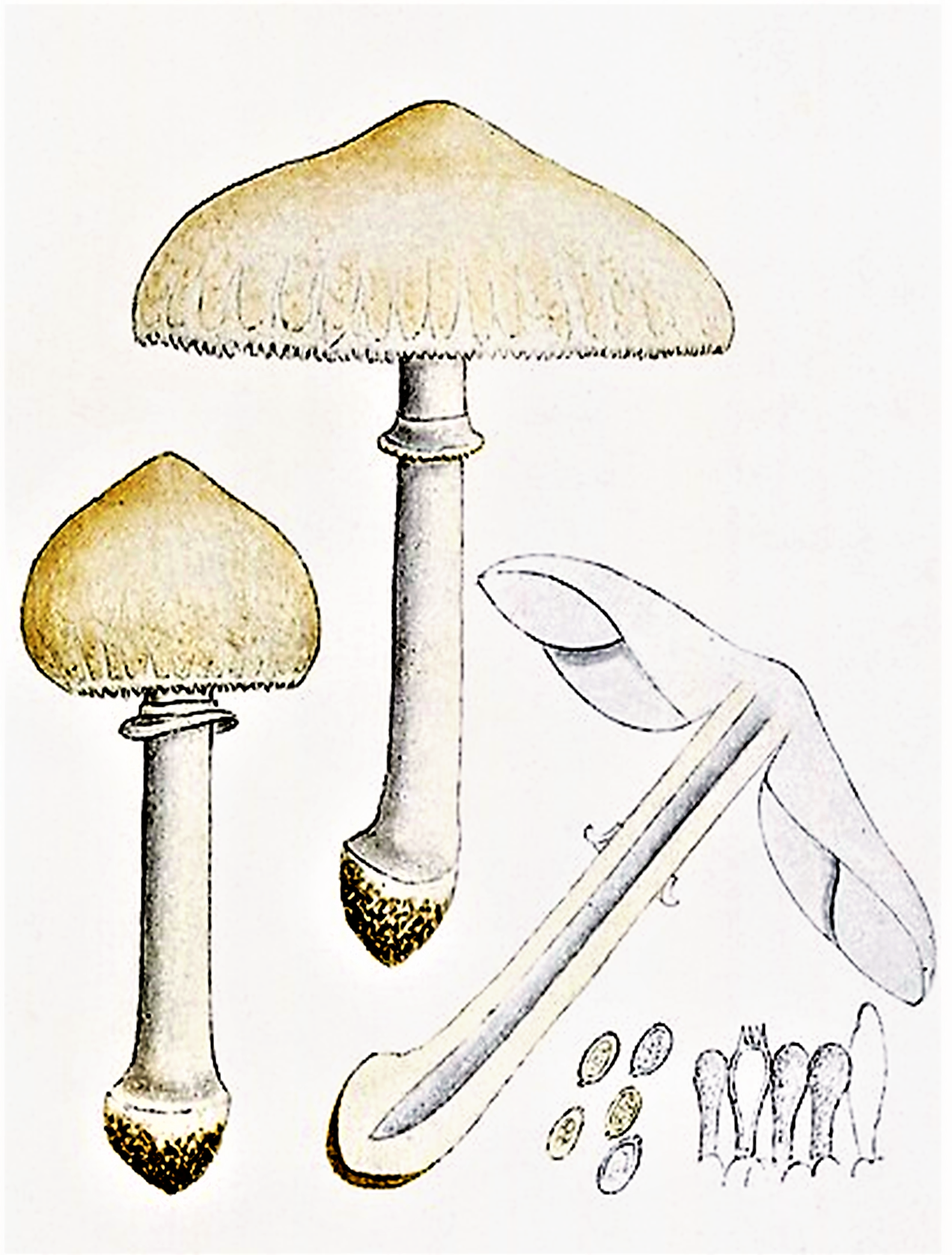 Giacomo Bresadola: Lepiota excoriata (Schaeff., 1774 ex (P.Kumm., 1871) , heute Macrolepiota excoriata (Schaeff.) M.M.Moser (1955)